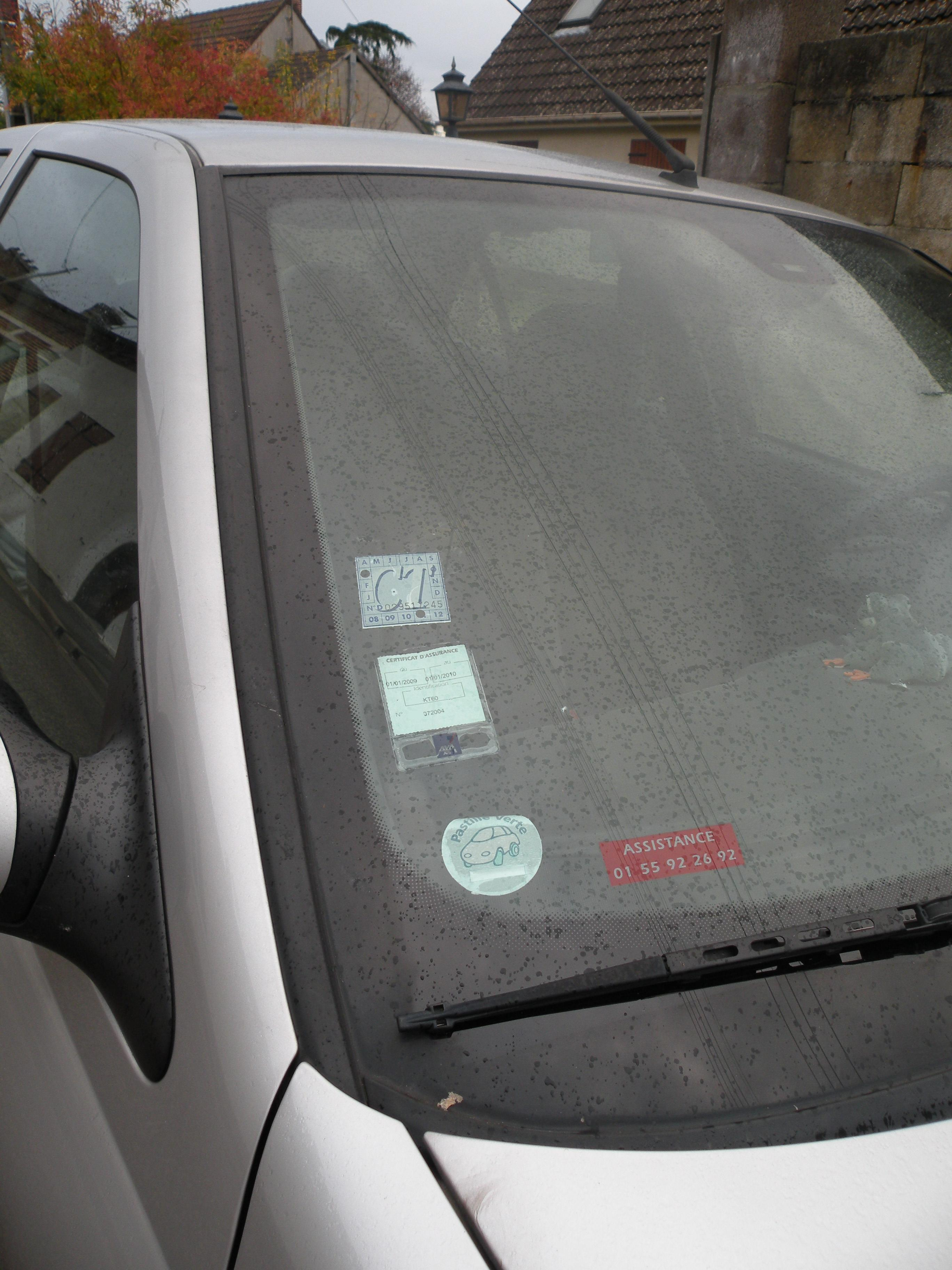 certificat d'assurance sur un pare brise + controle technique et pastille verte